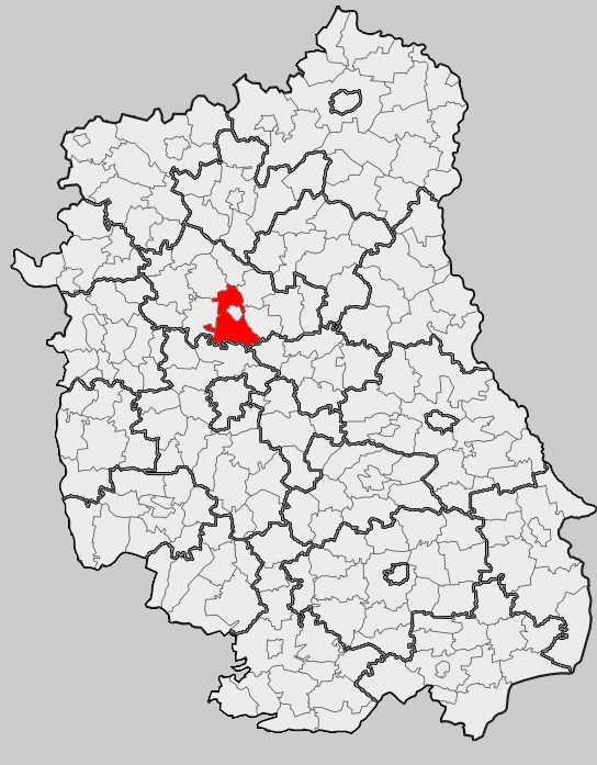 Map of gmina Lubartów (rural), Lubartów county, Lublin voivodship Mapa gminy Lubartów (wiejska), powiat lubartowski, województwo lubelskie